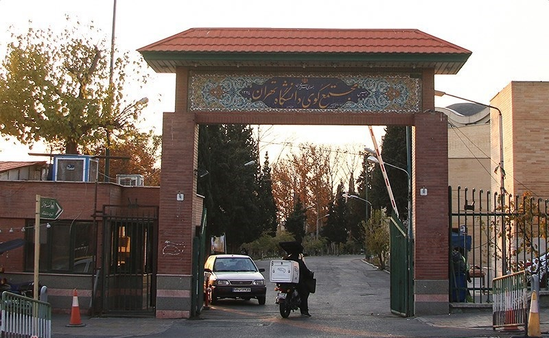 امیرآباد